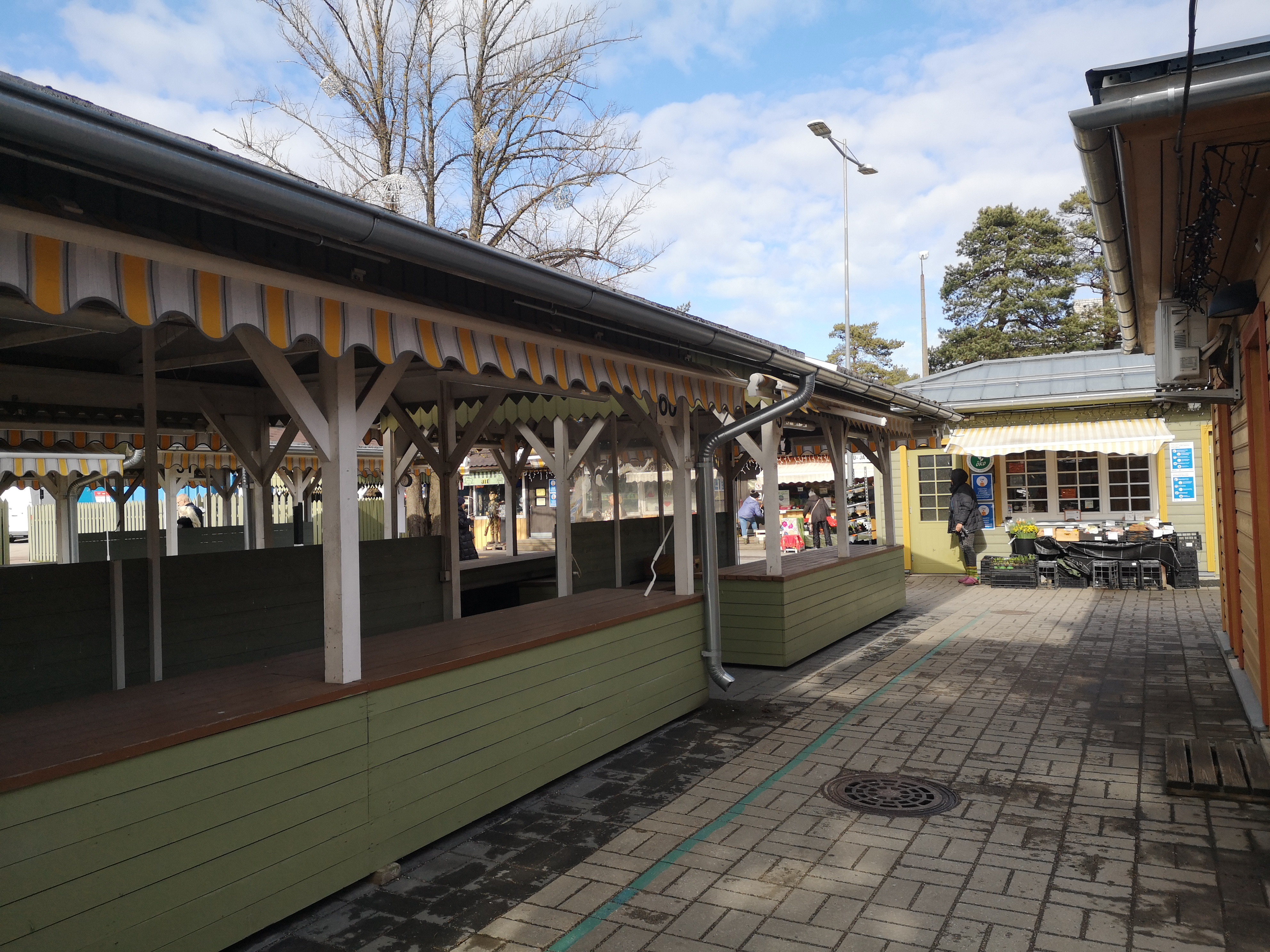 Nõmme turg koroonakriisi ajal.